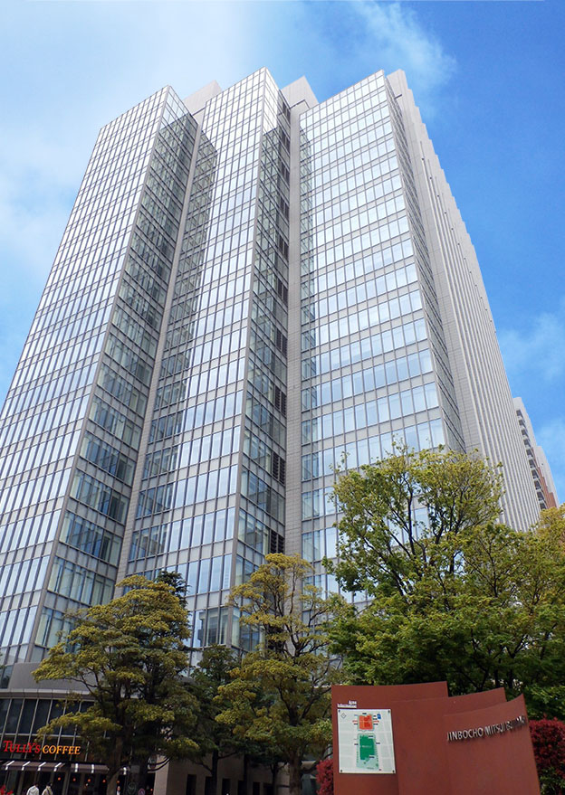 神保町三井ビルディング外観（晴れの日）